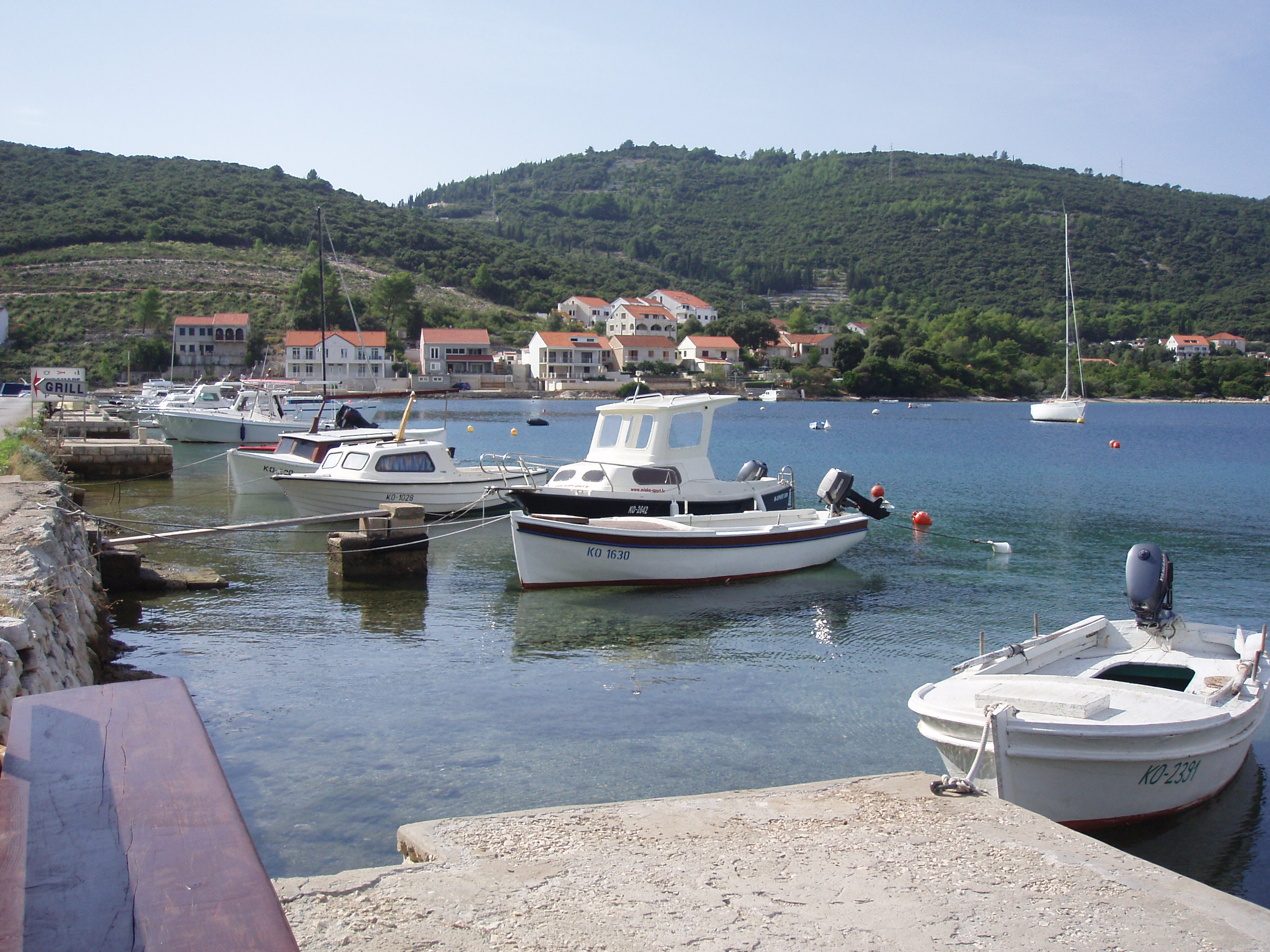 Žrnovska Banja